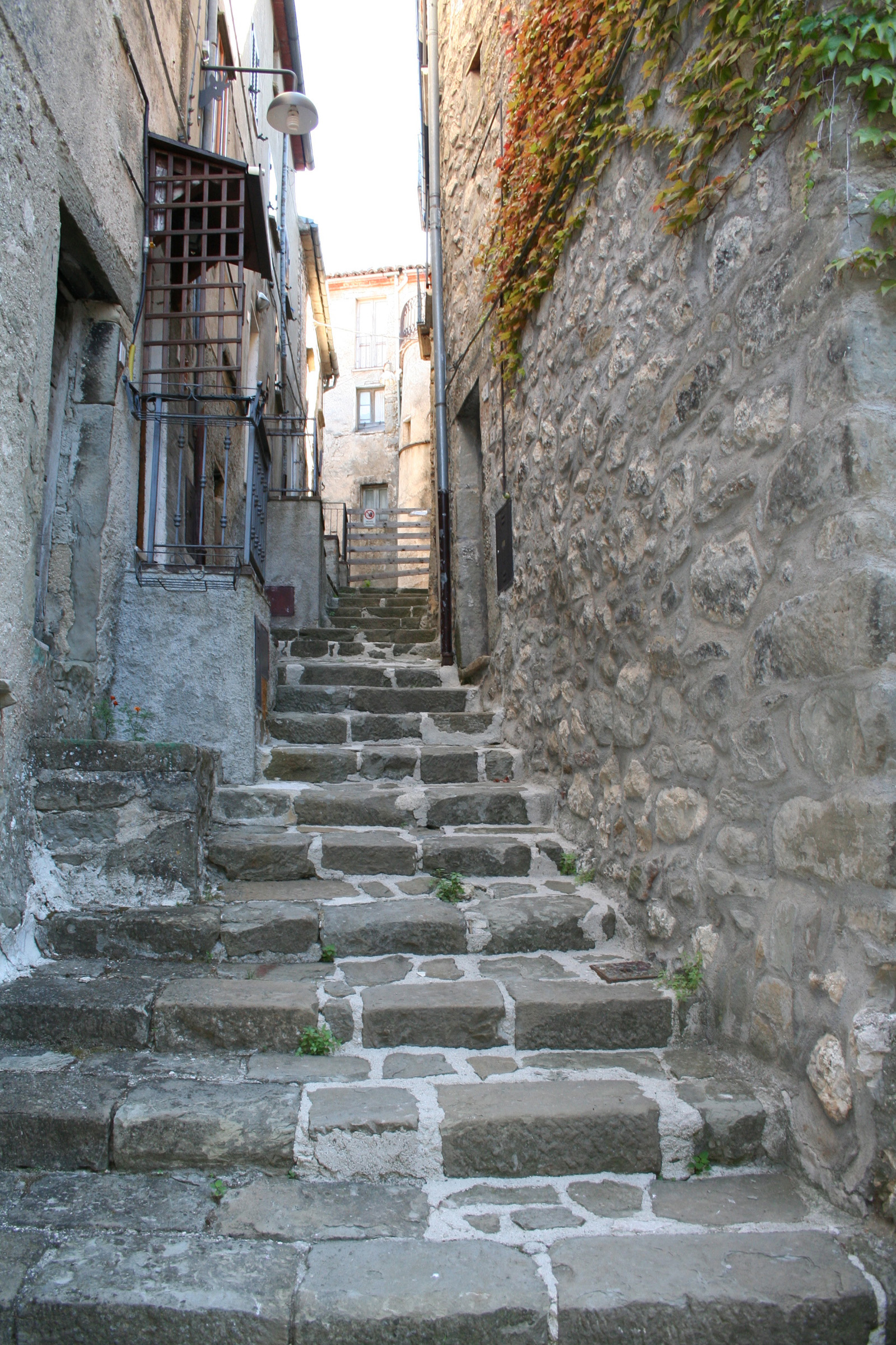 Pietracamela in provincia di Teramo. Interno del paese.